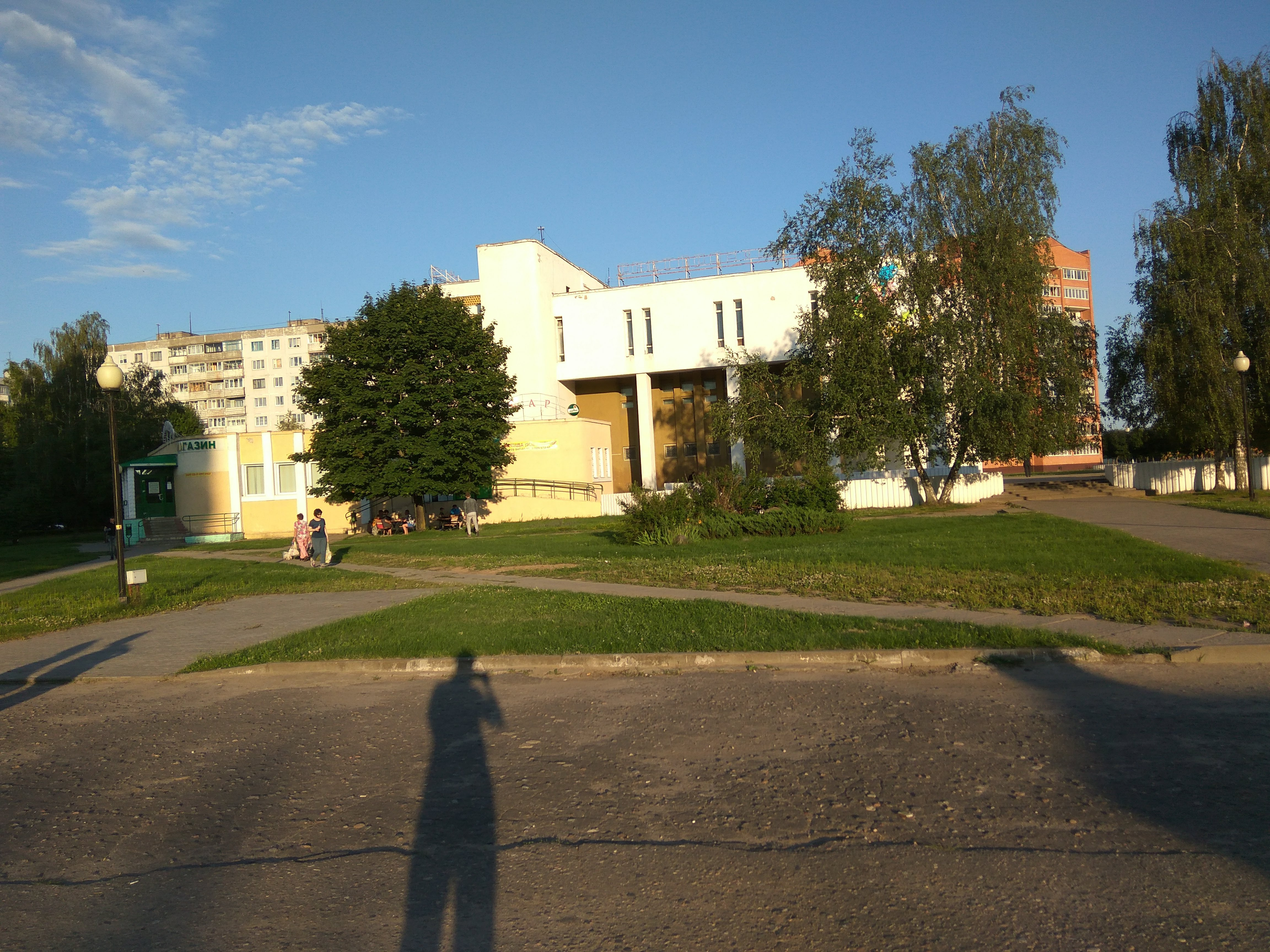 Магілёў. Вуліца Астроўскага